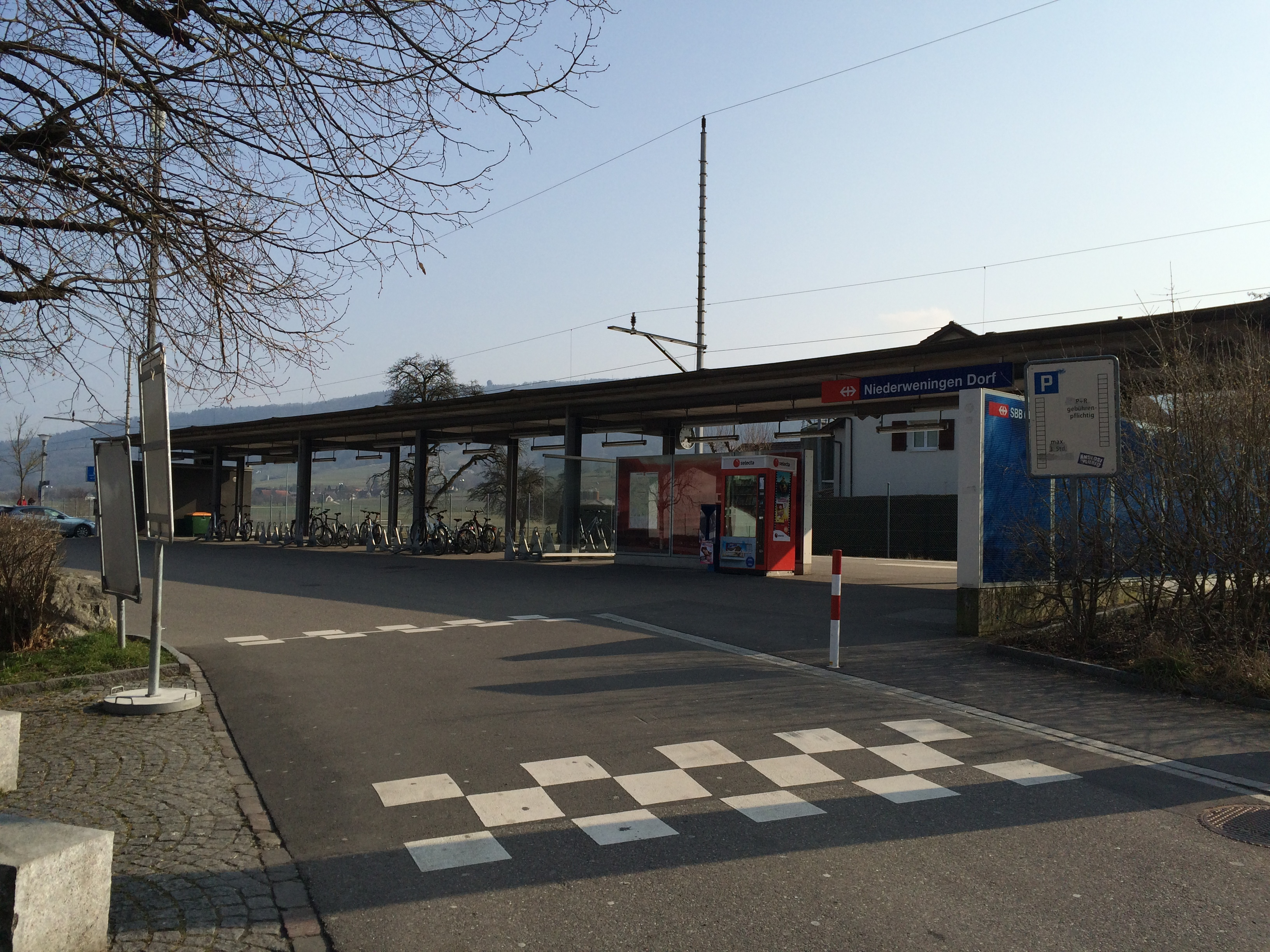 Niederweningen Dorf railway station